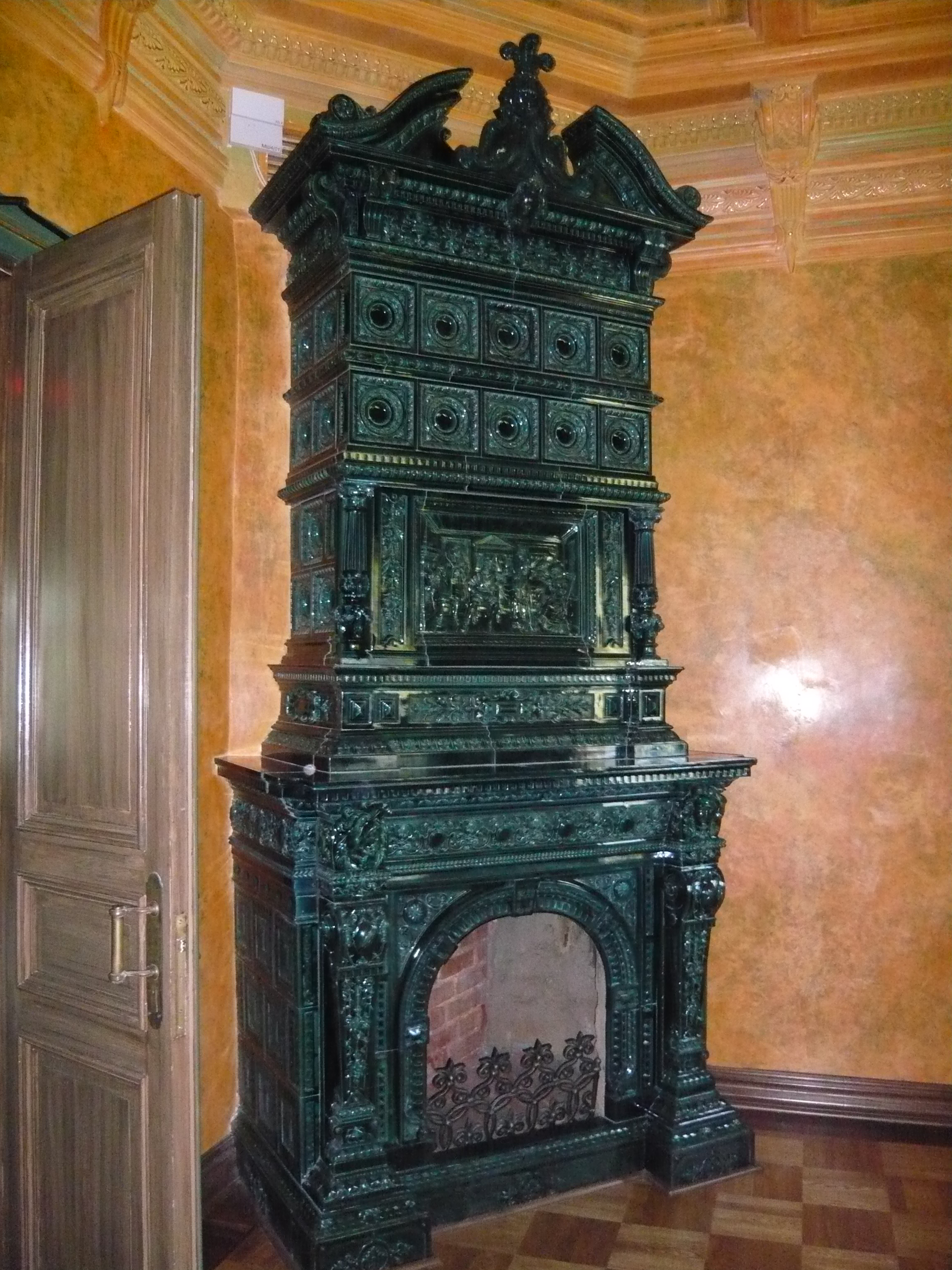 Интерьеры музея в Лошицах в главном здании усадьбы. Минск. Май 2015 года